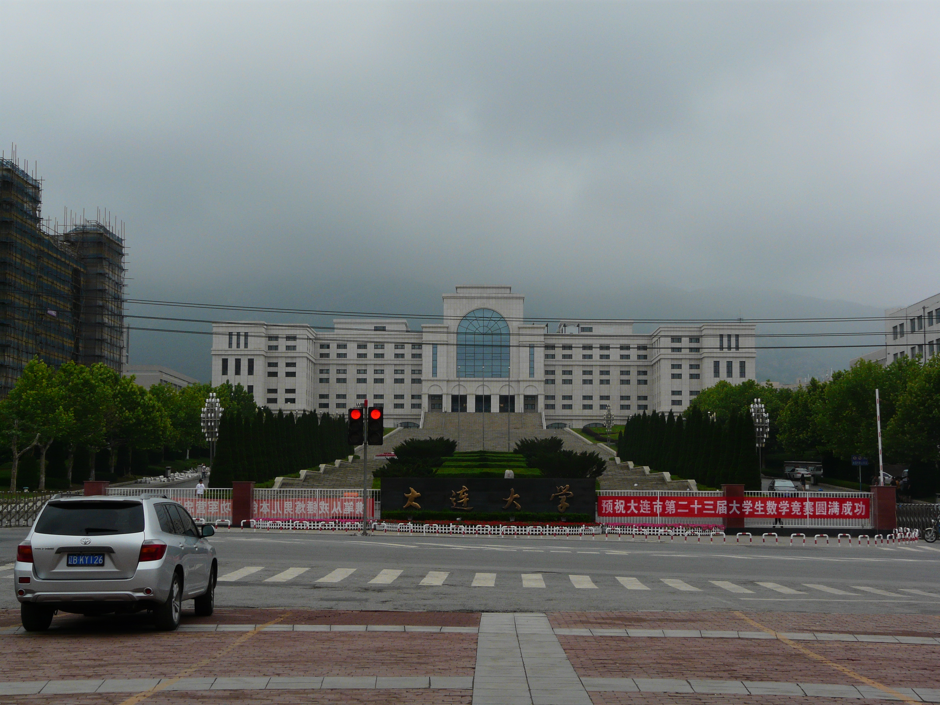 辽宁省大连市开发区 大连大学